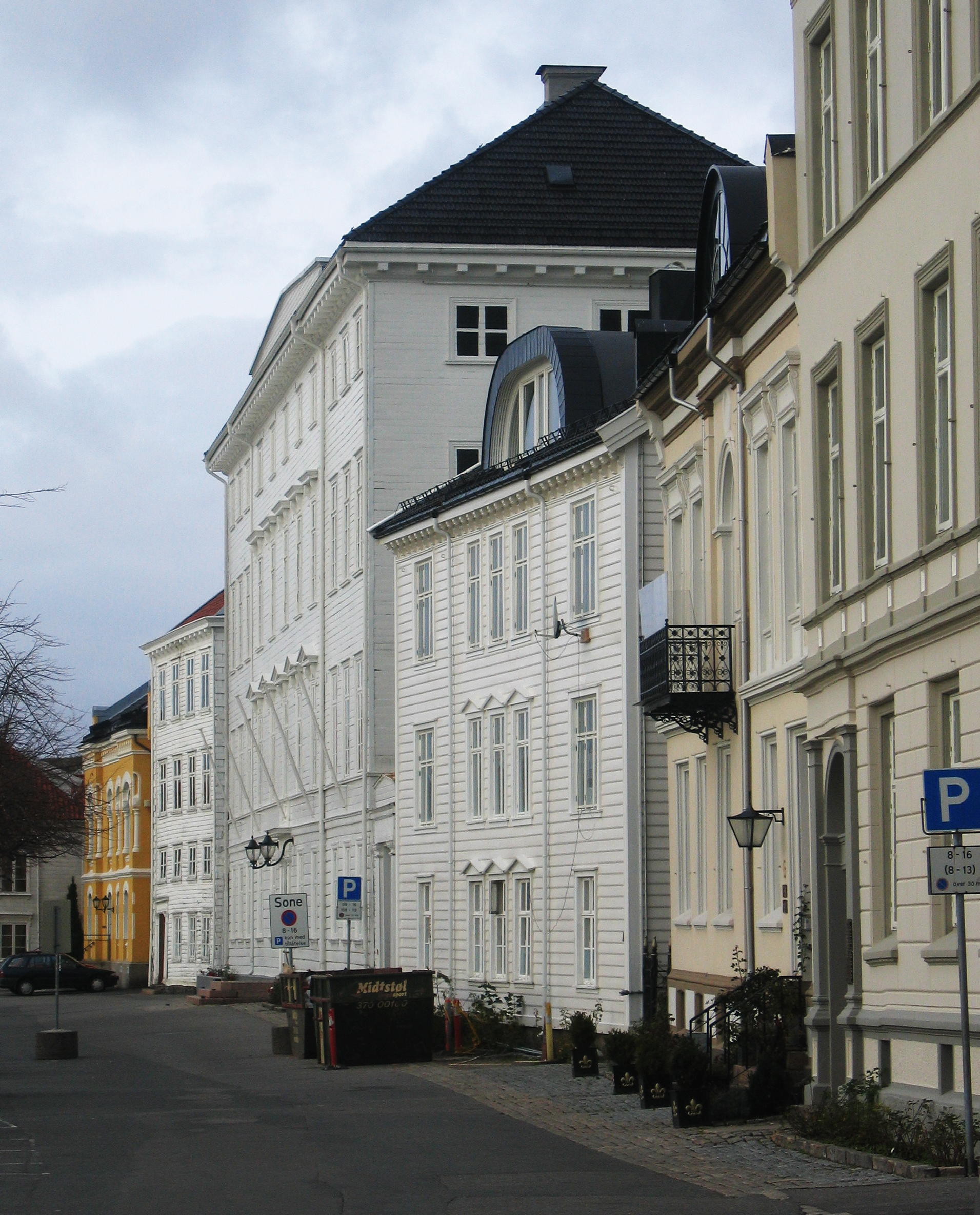 Husrekke i Rådhusgaten i Arendal.